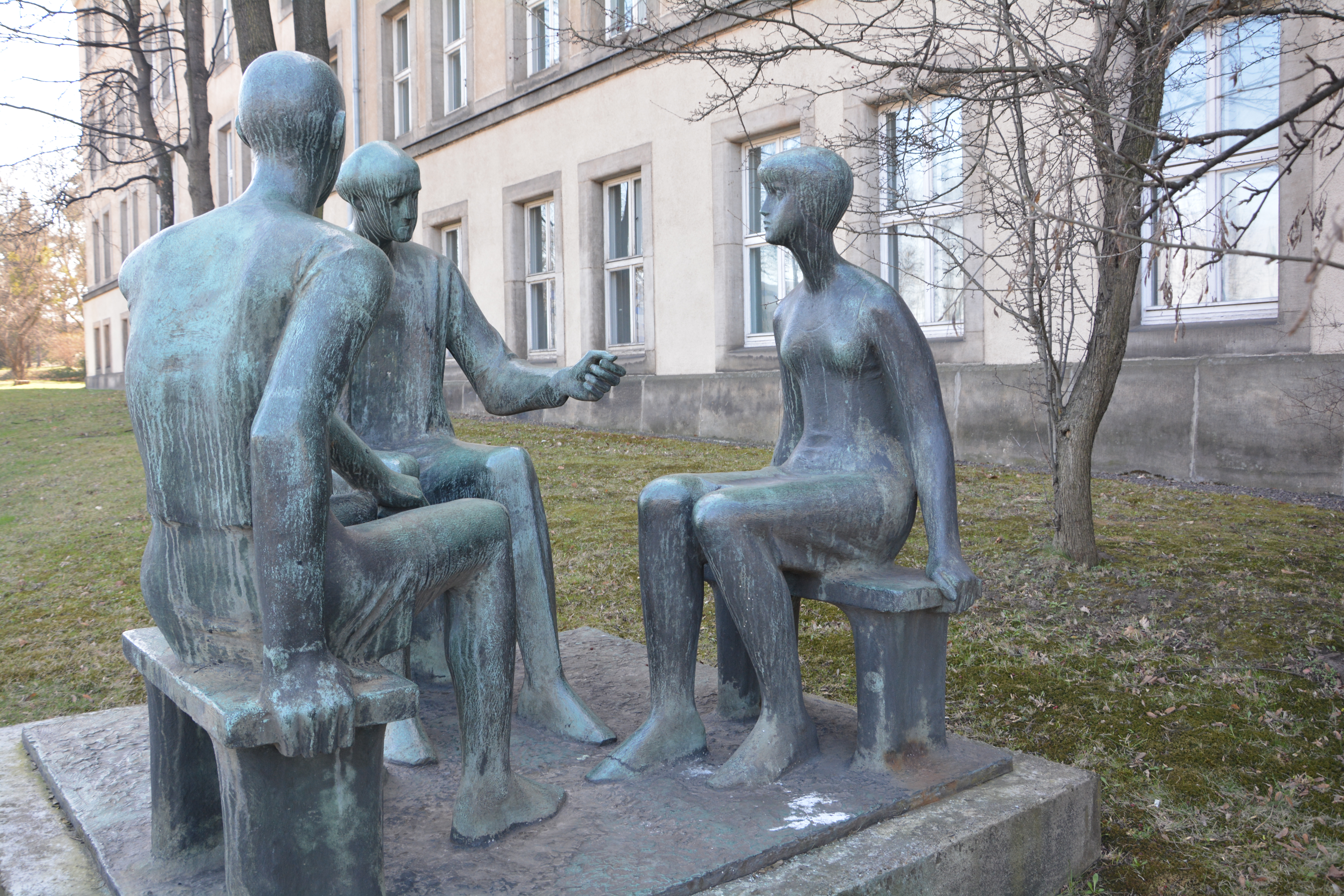 Dresden,TU-Gebäude am Weberplatz, Königliches Lehrerseminar - Arbeiter -und Bauernfakultät heute Erziehungswissenschaftliche Faklutät am Weberplatz. Figurengruppe von Wolfram Hesse "Lehrende und Lernende" an der Teplitz Str. 16 um 1967-70